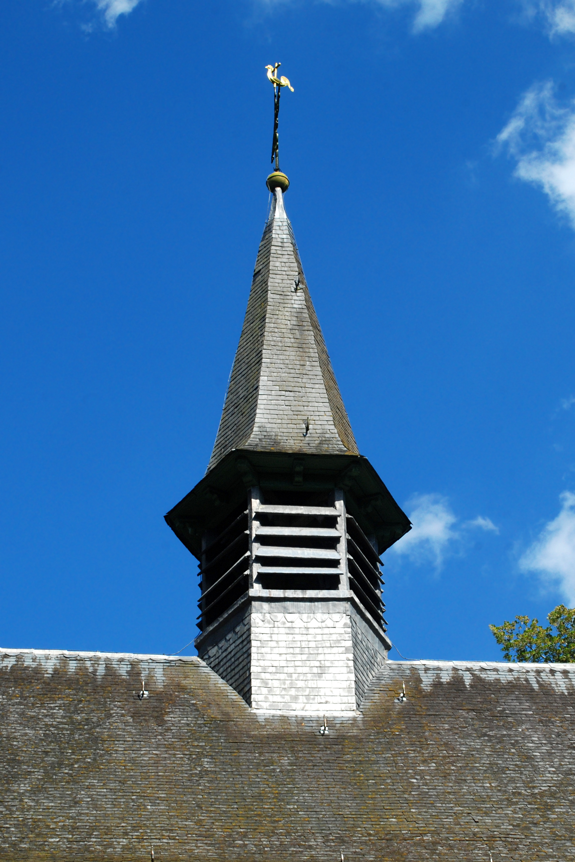 Belgique - Brabant flamand - Oud-Heverlee - Chapelle Notre-Dame de Steenbergen